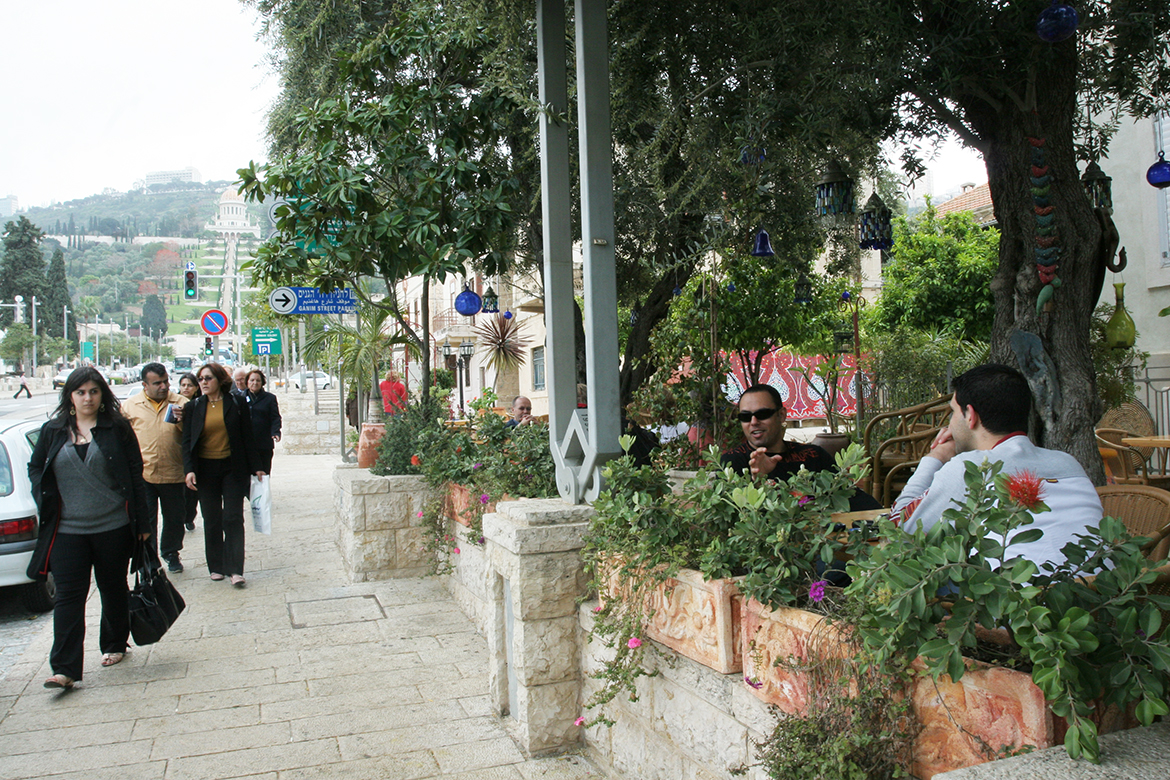 המושבה הגרמנית, חיפה